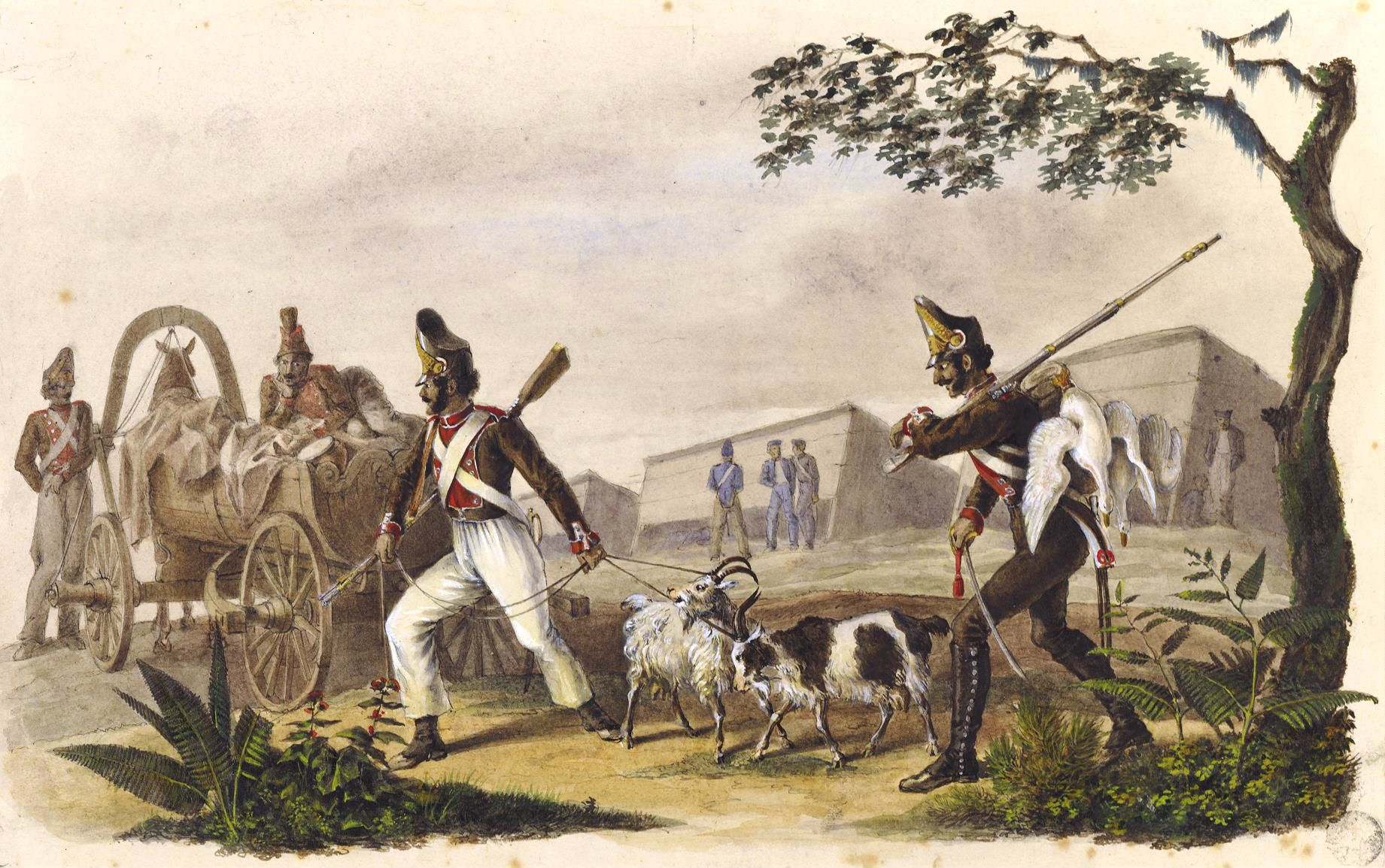 Беларуская (тарашкевіца): Бівак каля Лёзна (Lozna)